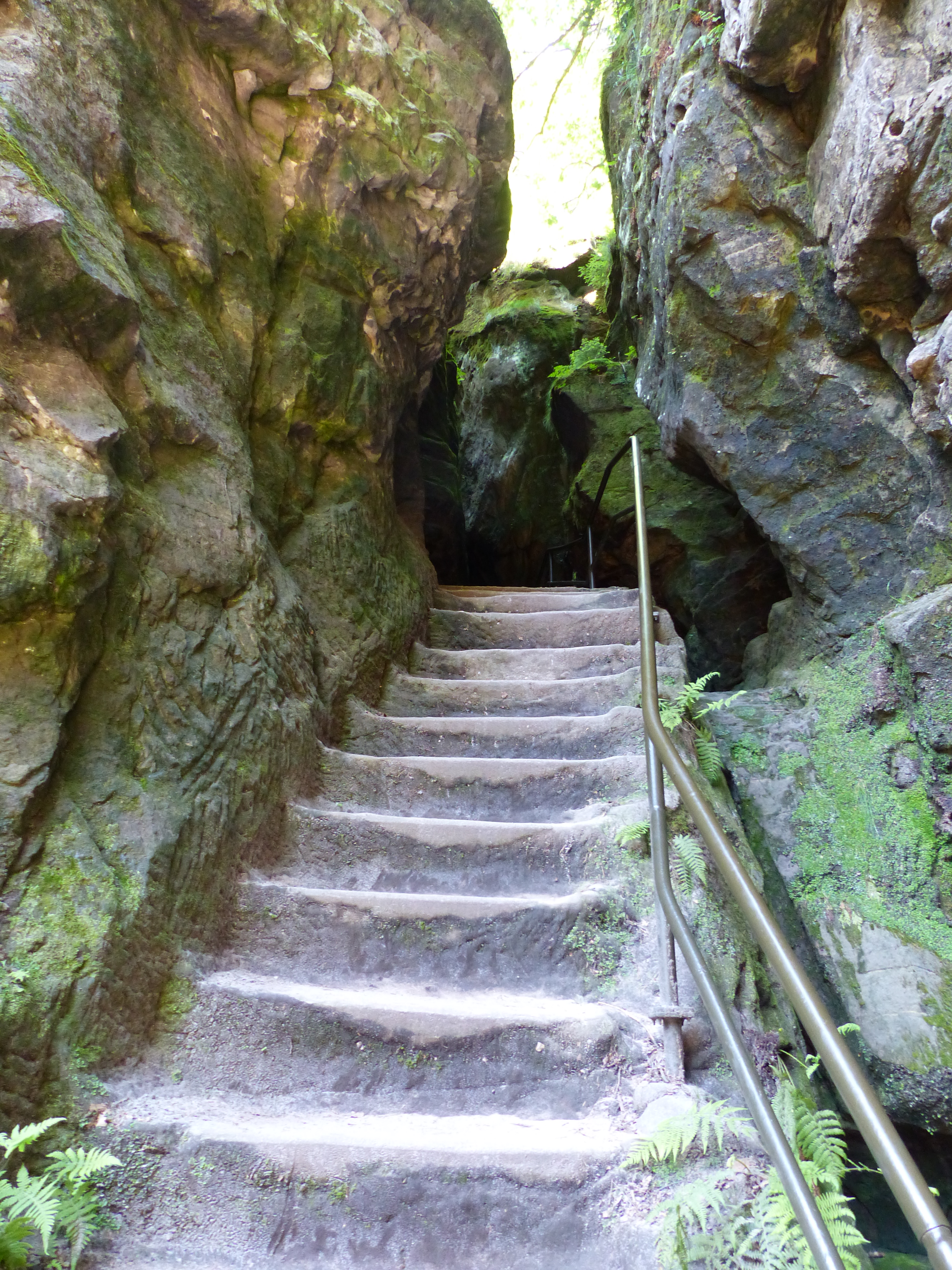 Schwedenlöcher bei Rathen und Bastei im Nationalpark Sächsische Schweiz